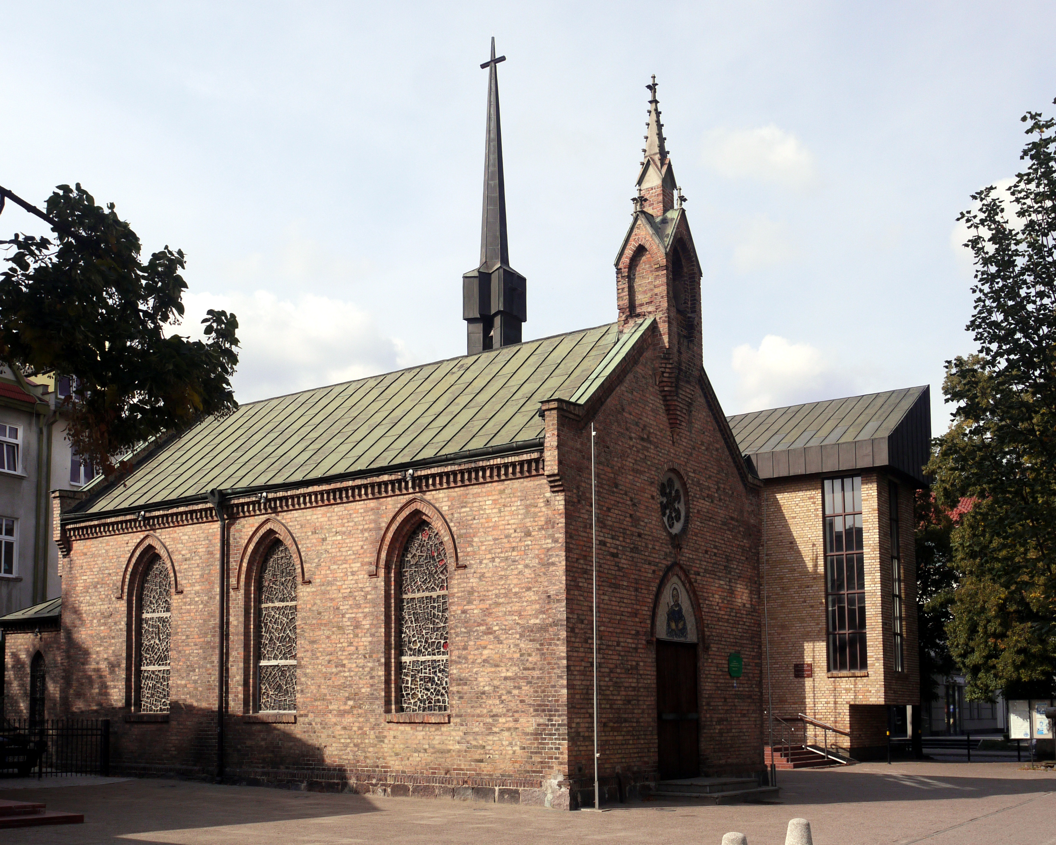 Kaplica pw. NMP i św. Andrzeja Boboli ul. Powstańców Warszawy 15, Sopot